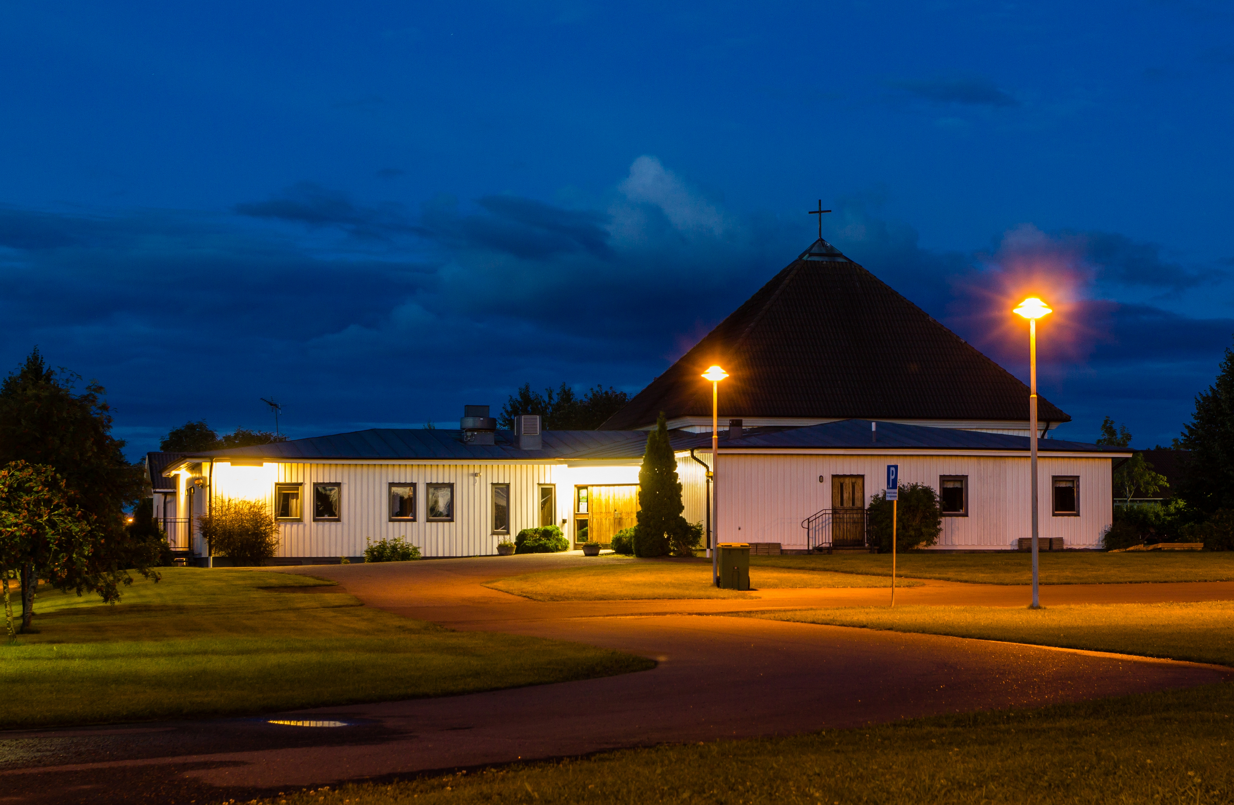 Linghemskyrkan (Equmenia), Linghem, Linköpings kommun, Östergötland, Sverige